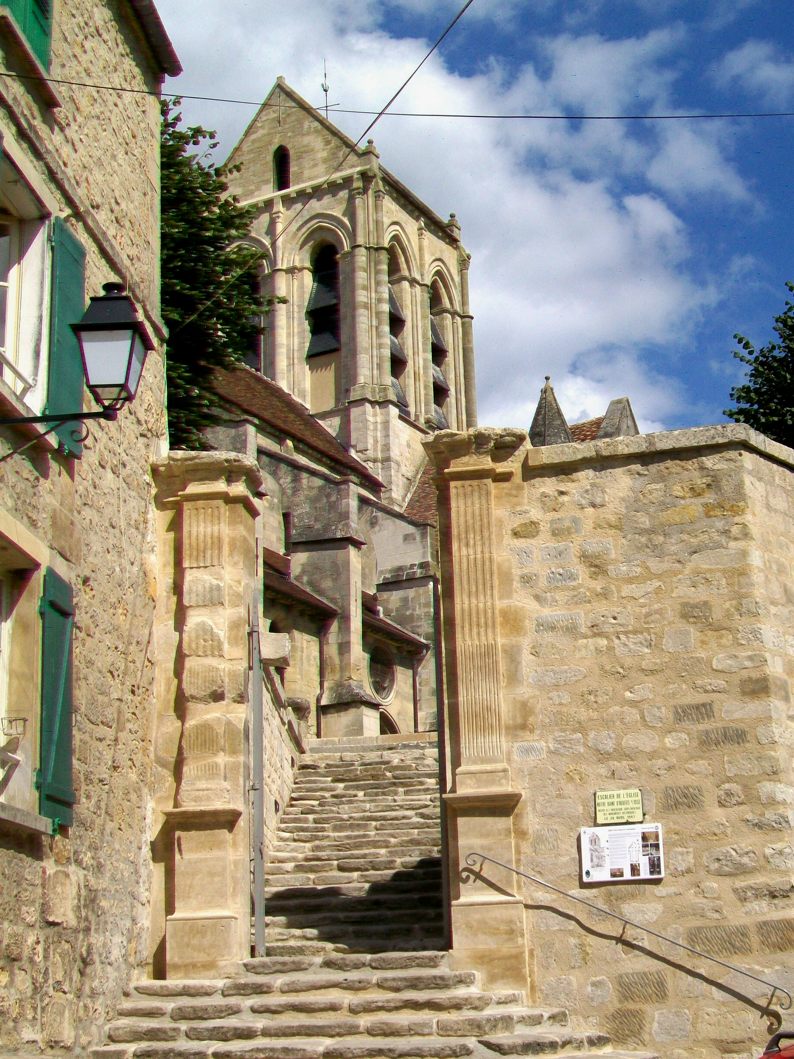 L'escalier de 1615 qui permet de rejoindre l'église depuis la rue Daubigny.